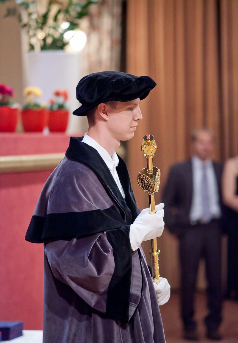 pedel při promoci